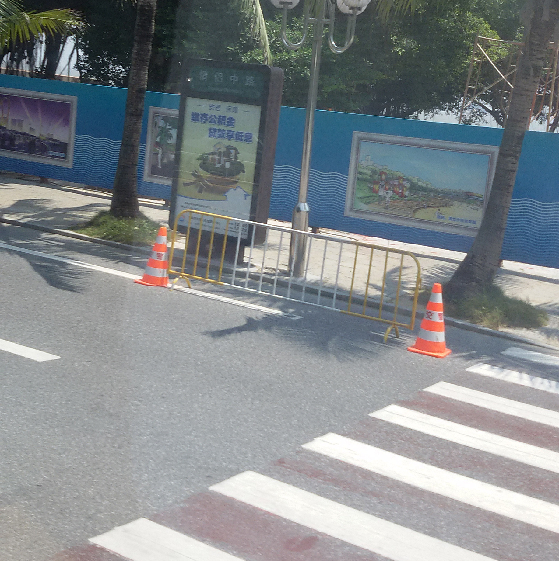 粵語: 情侶中路嘅路牌